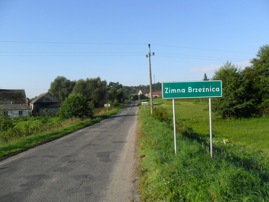 Zimna Brzeżnica